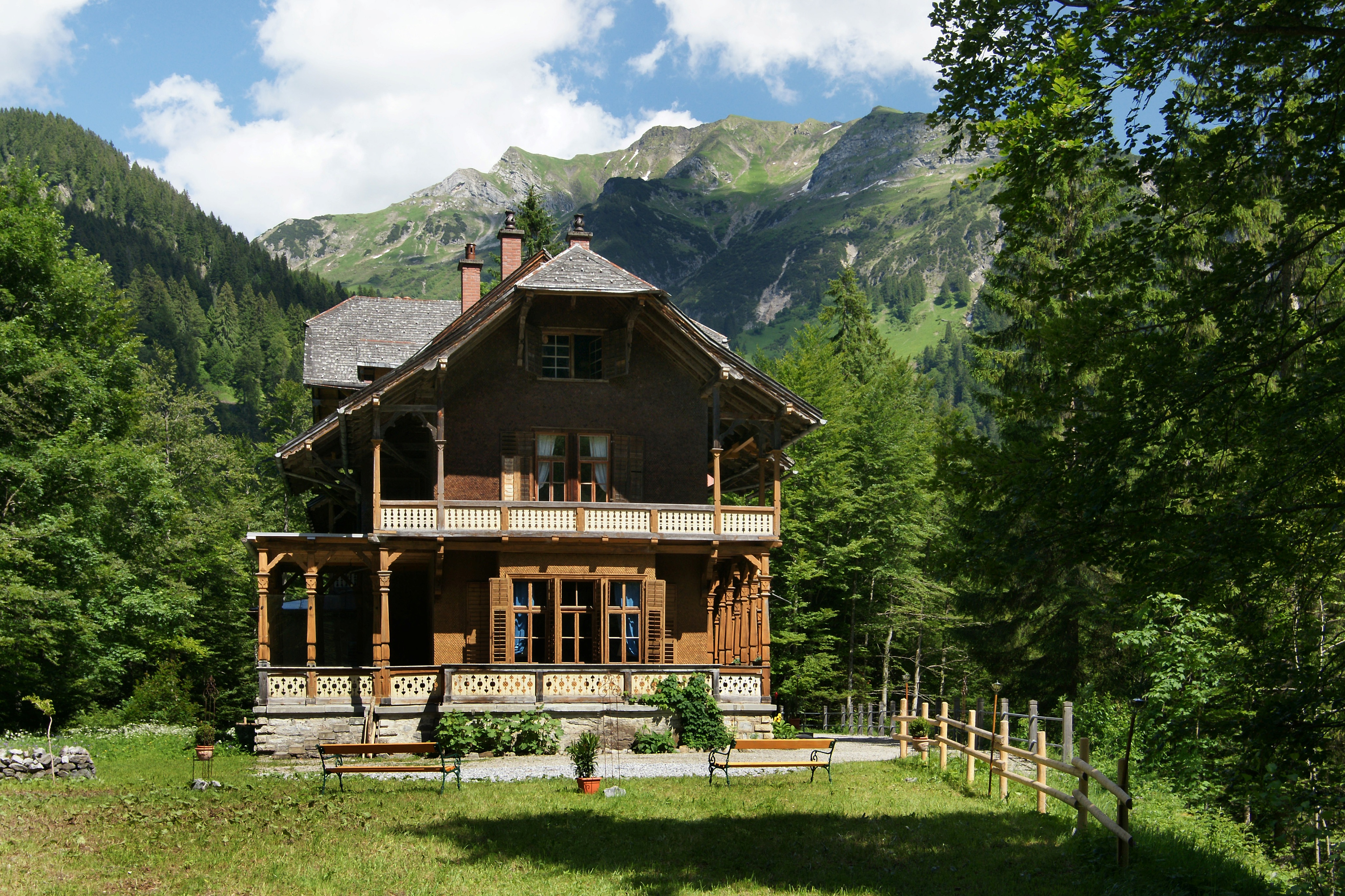 Die Villa Maund wurde 1895 als Jagdvilla im englischen Landhausstil vom Bankier Sir John Oakley Maund, auf dem Ausläufer der Ünschenberg Alp bei Hinterhopfreben erbaut. Im Bild die Westansicht mit dem dahinter liegenden Heiterberg (2188 m).